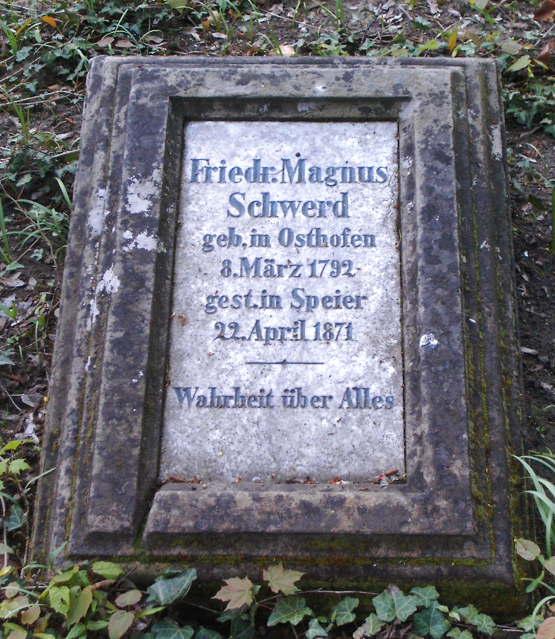 Grabplatte Friedrich Magnus Schwerd, Phyiker und Astronom, Alter Friedhof Speyer